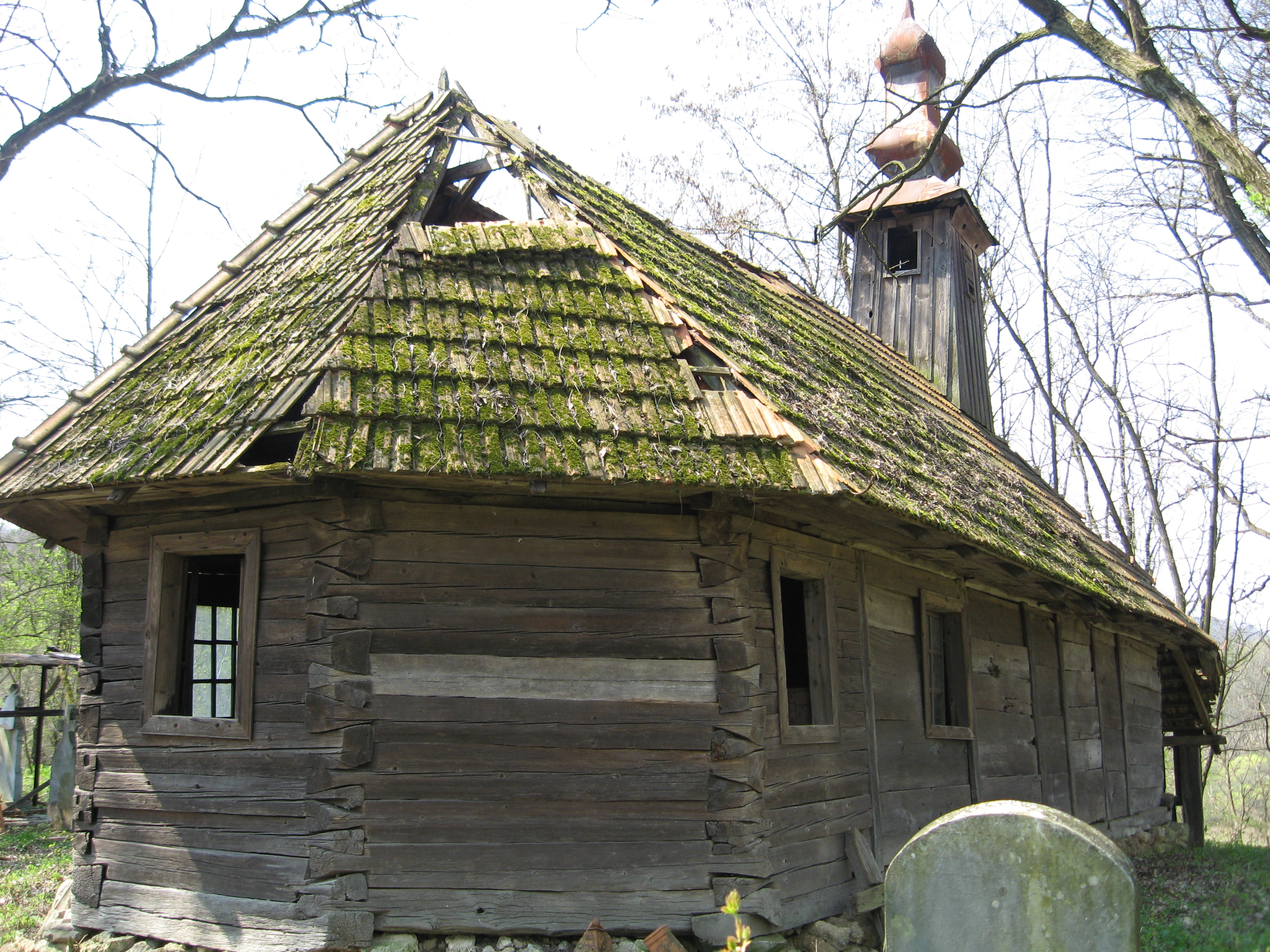 Biserica de lemn din fostul sat Baștea, județul Hunedoara